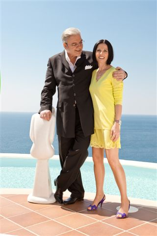 Karl Heinz Richard von Sayn-Wittgenstein mit Frau Andrea Johanna von Sayn-Wittgenstein